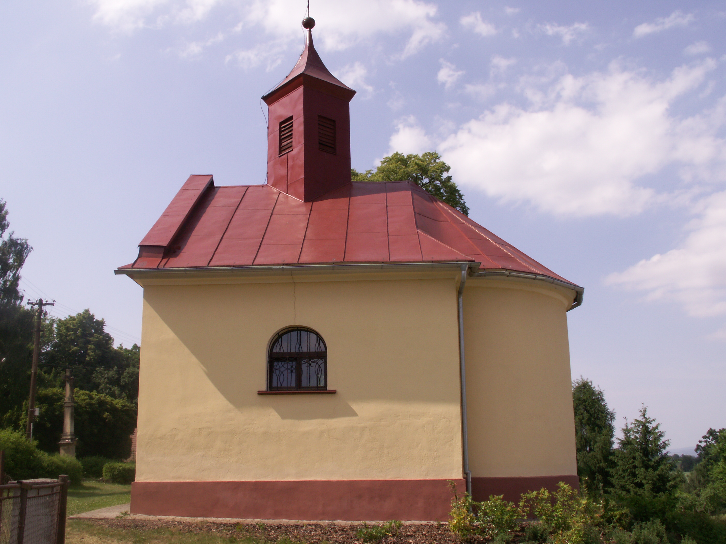 Květná, část obce Luková v okrese Ústí nad Orlicí, kaple svatého Vavřince